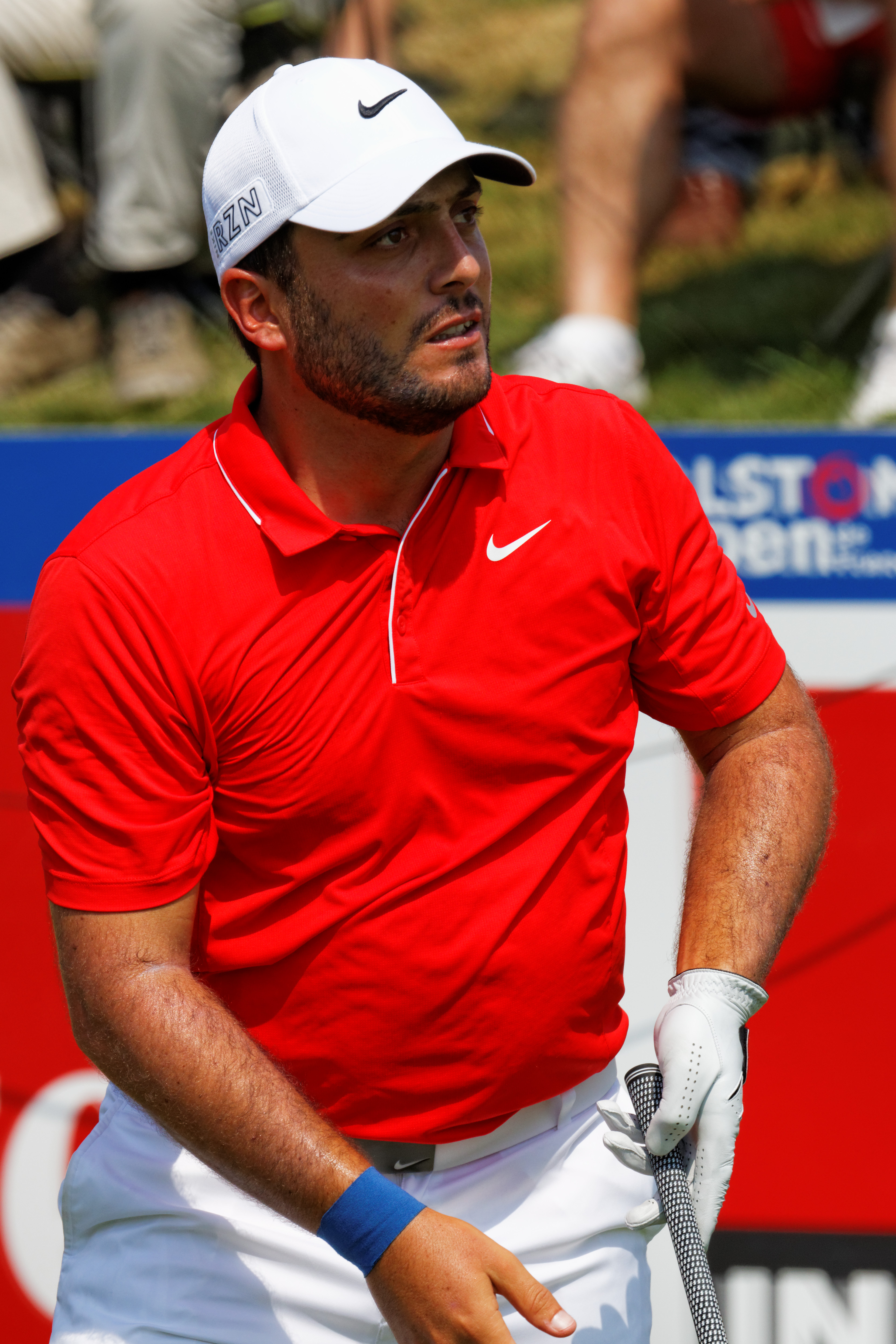 Photo prise lors de l'Alstom - Open de France 2015 à St Quentin en Yvelines